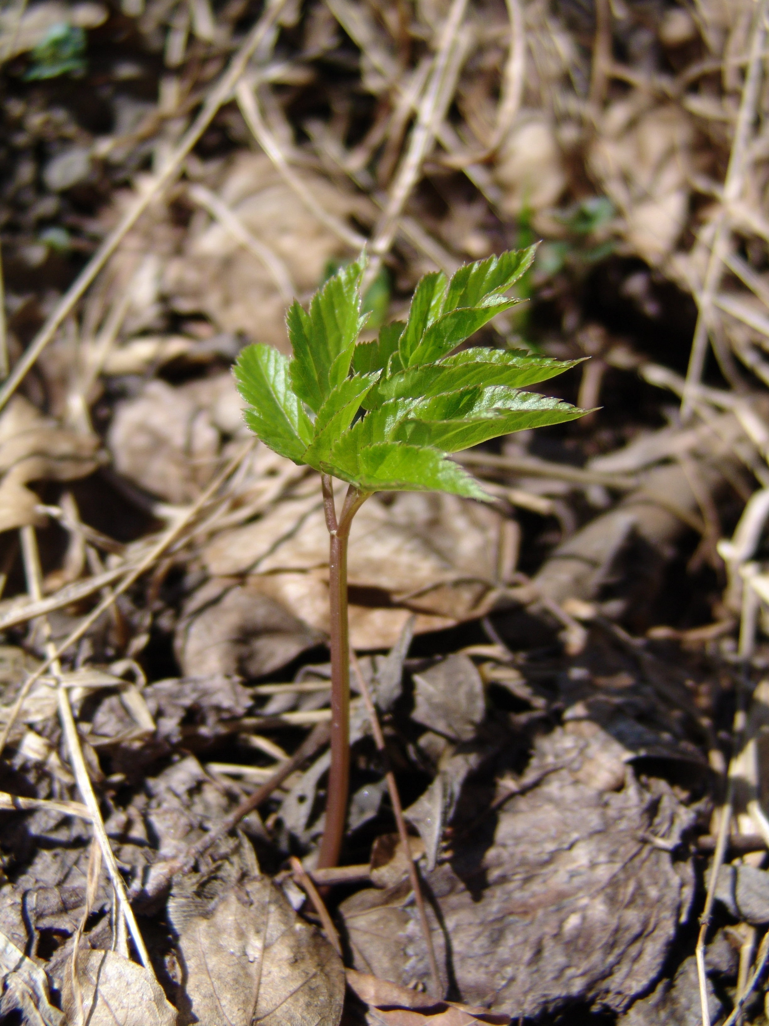 Young shoot of Ground-elder (Aegopodium podagraria) German description: Jungtrieb einer Giersch-Pflanze (Aegopodium podagraria)